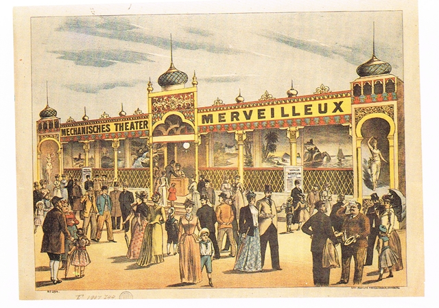 Plakat für das Mechanische Theater Merveilleux, Farblitho 57 x 77 cm, Adolph Friedländer Nr. 0294, 1891 oder 1892 Das Mechanische Theater (Inh. Wilhelm Hartjens) bestand von etwa 1840 bis 1900 in Bremen, ging auch auf Tournee. Seine meisten Figuren bestehen aus Metall und sind flach, beidseitig bemalt. Die von Hartjens angefertigten Figuren wurden über einen Zahnradantrieb bewegt.